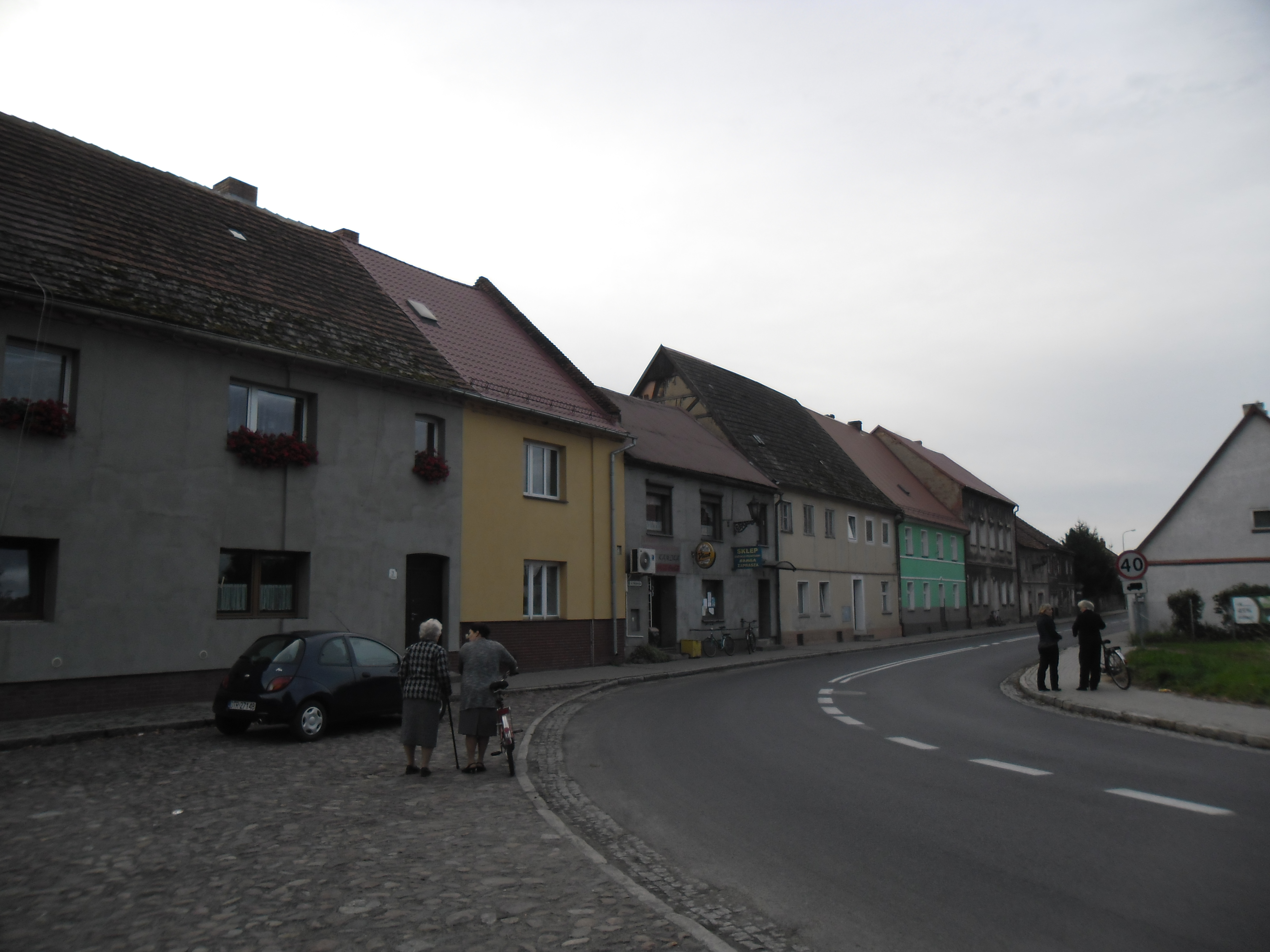 Pierzeja zachodnia rynku w Urazie - skrzyżowane ul. Wolności z Wrocławską. Widok na budynek o wyraźnej konstrukcji szachulcowej